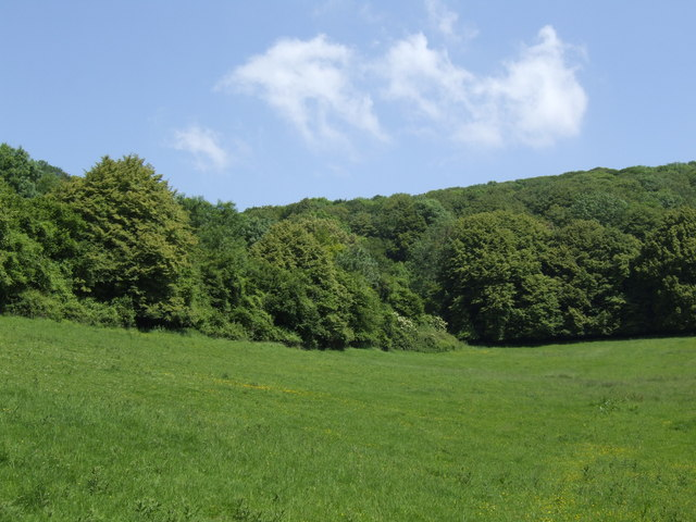 Cheddar Wood